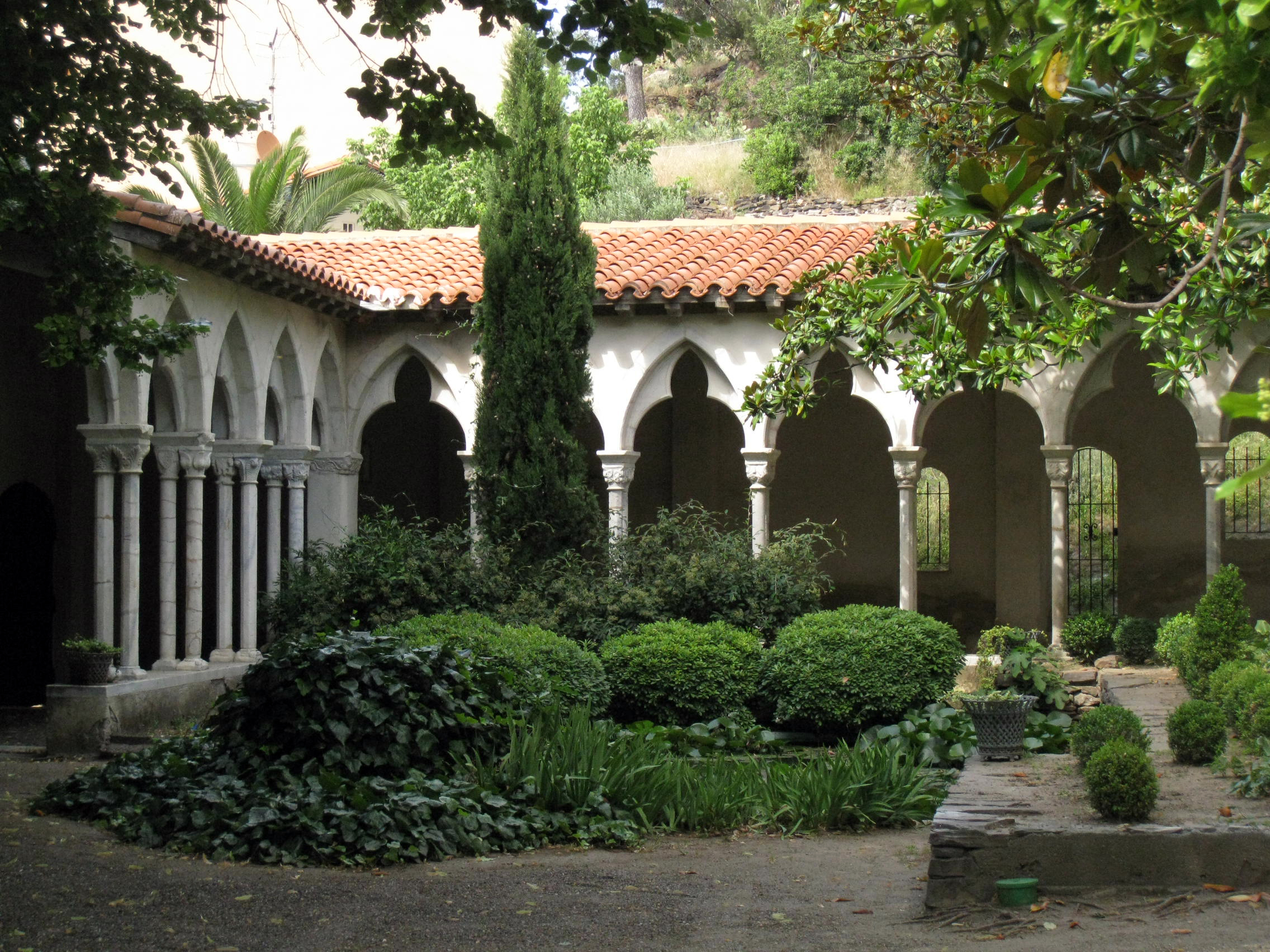 Antiga església i convent de Sant Domènec (Cotlliure, Rosselló)